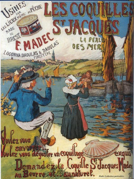 Conserverie de Saint-Jacques Madec au Domaine de Moulin Mer, Logonna-Daoulas